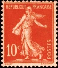 Timbre au type Semeuse camée ou à fond plein, avec sol et « téton » qui dépasse [en réalité, l'armature du sac de grains]. Il est émis le 15 mai 1906. Dessin d'après Oscar Roty, gravure exécutée par Louis-Eugène Mouchon.